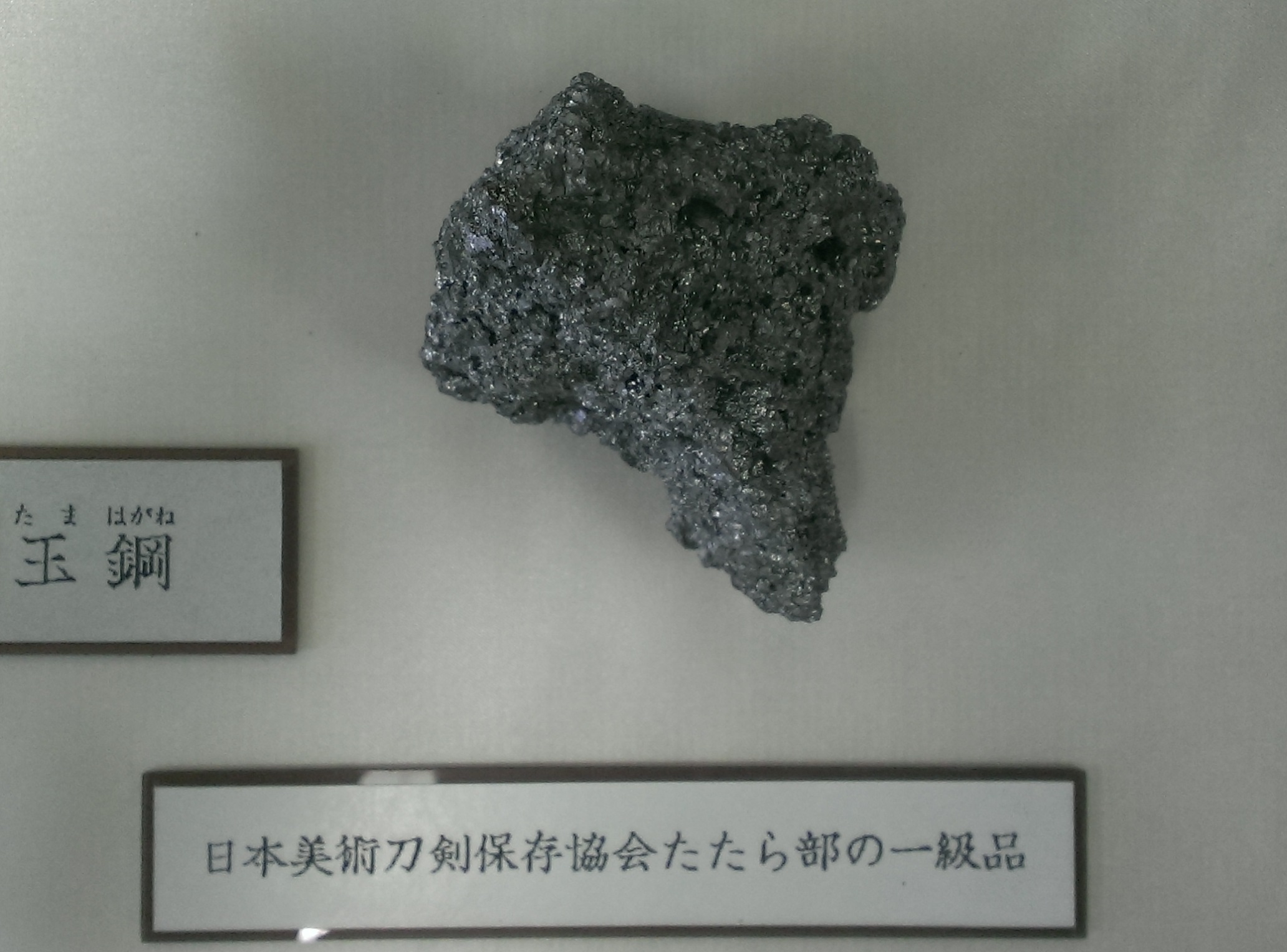 certificated as the 1st class by the Society for Preservation of Japanese Art Swords